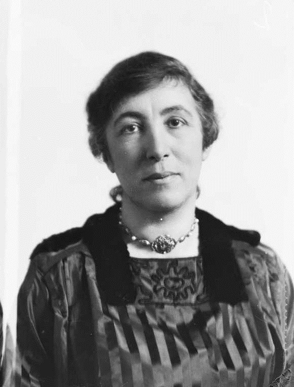 Portrett av Nini Roll Anker, kvinne, forfatterinne, brystbilde.